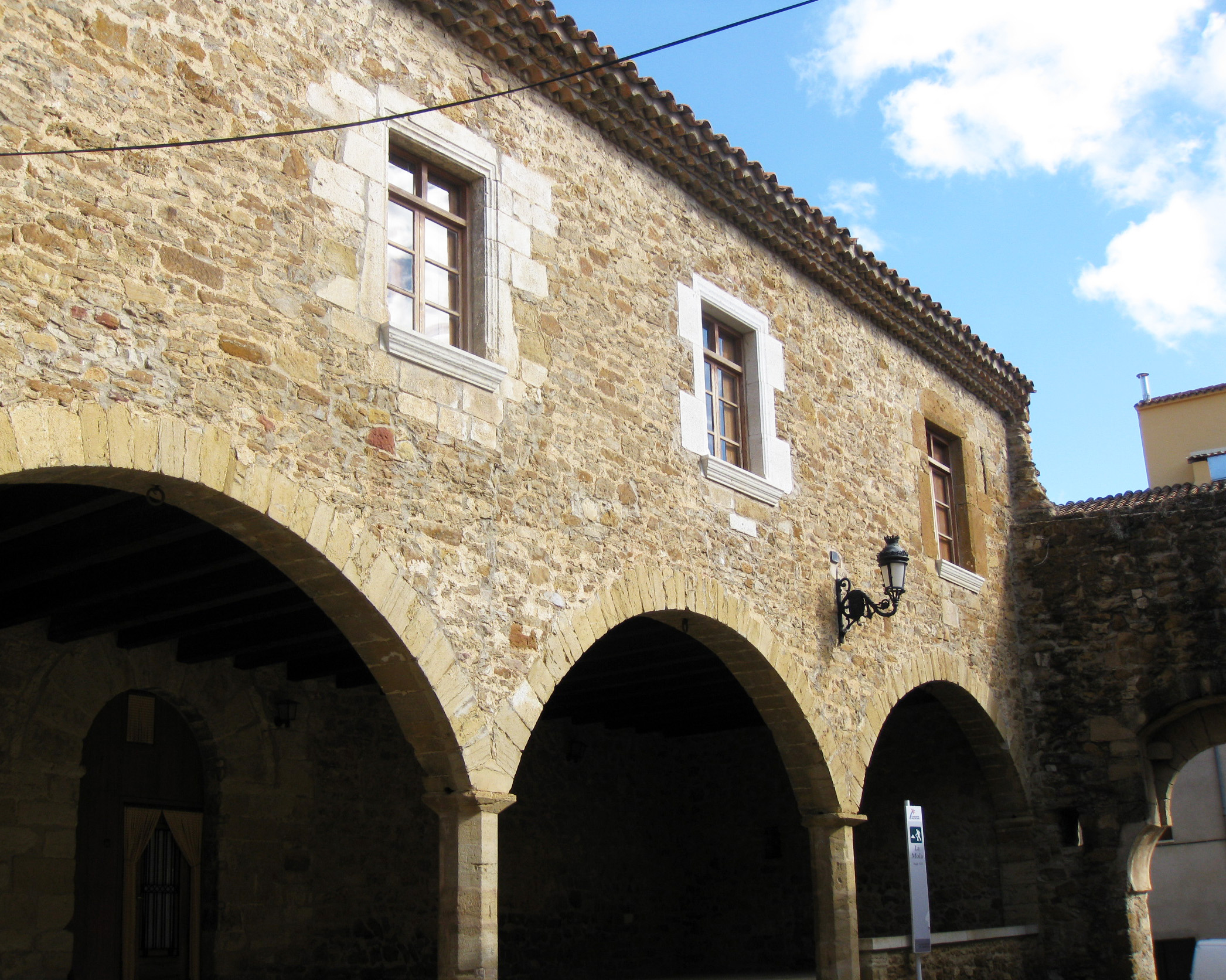 L'anomenat castell de la_Mola,_Museu_Arqueològic_de_l'Alt_Maestrat (Benassal)